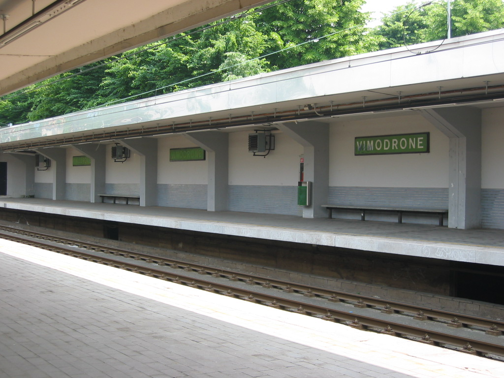 La fermata Vimodrone della metropolitana di Milano